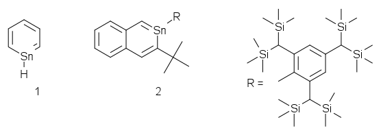 Stannabenzene